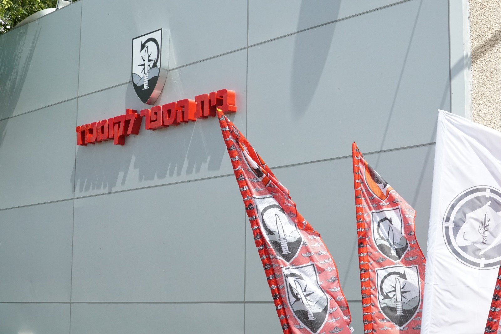 היום (ראשון), התקיים טקס חנוכת בית הספר לקומנדו ב"מתקן אדם" בראשות מפקד זרוע היבשה, אלוף יואל סטריק, מפקד פיקוד המרכז, אלוף תמיד ידעי, מפקד "עוצבת האש", תא״ל ירון פינקלמן, מפקד "עוצבת הקומנדו", אל״ם קובי הלר, מפקדים נוספים ולוחמי העוצבה.